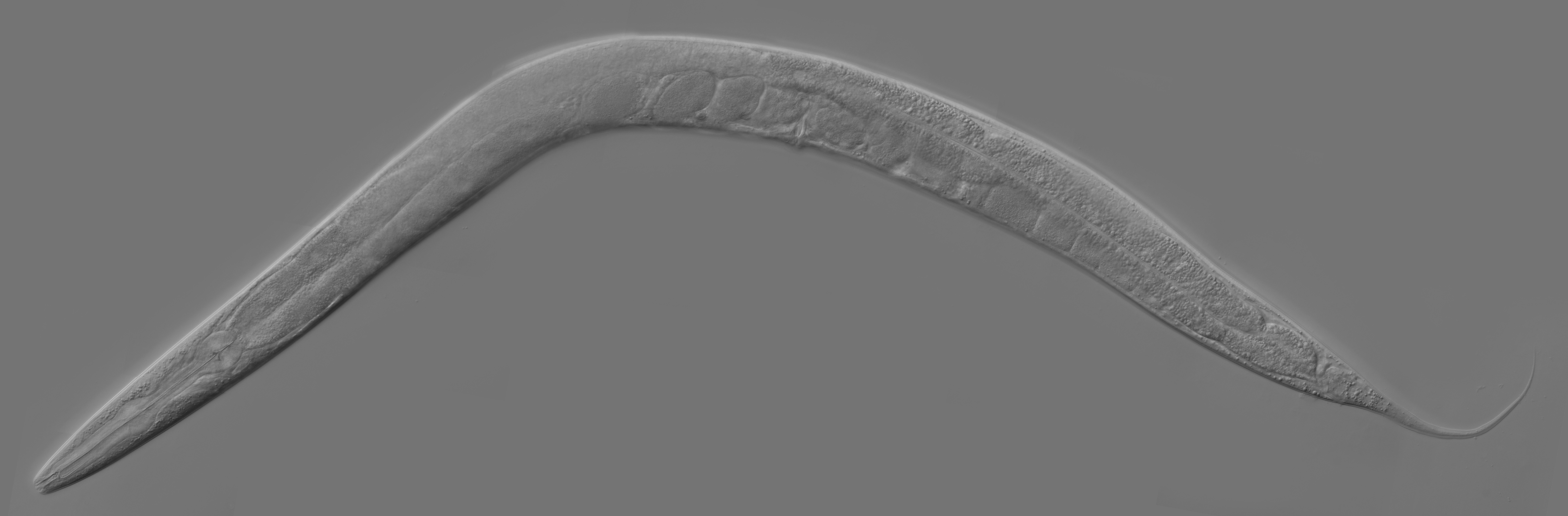 category:Caenorhabditis elegans